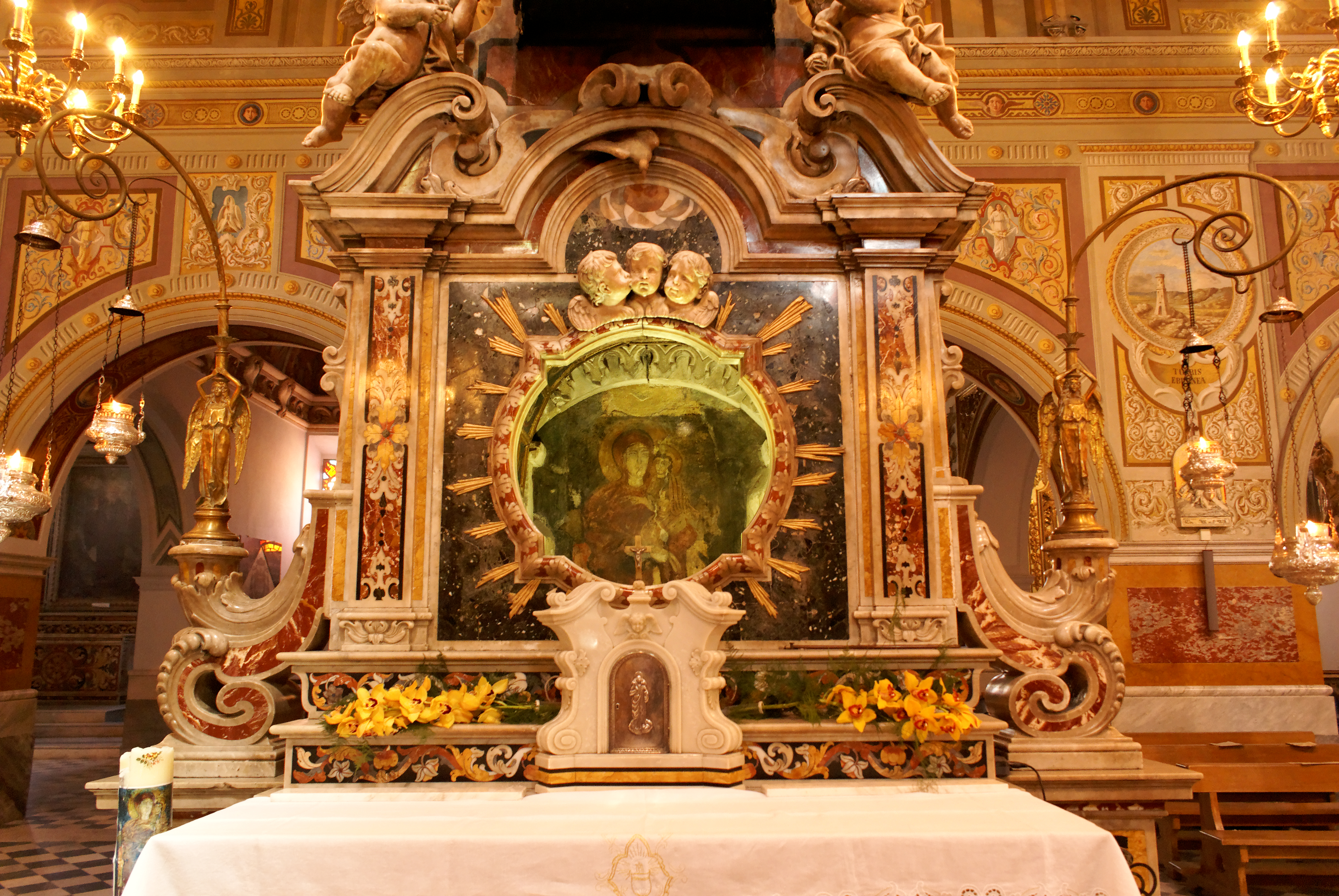 tabernacolo situato all'interno della cattedrale di Rossano (Calabria) contenente la raffigurazione della Santissima Madonna Acheropita che la tradizione vuole apparsa su un muro durante la costruzione della chiesa